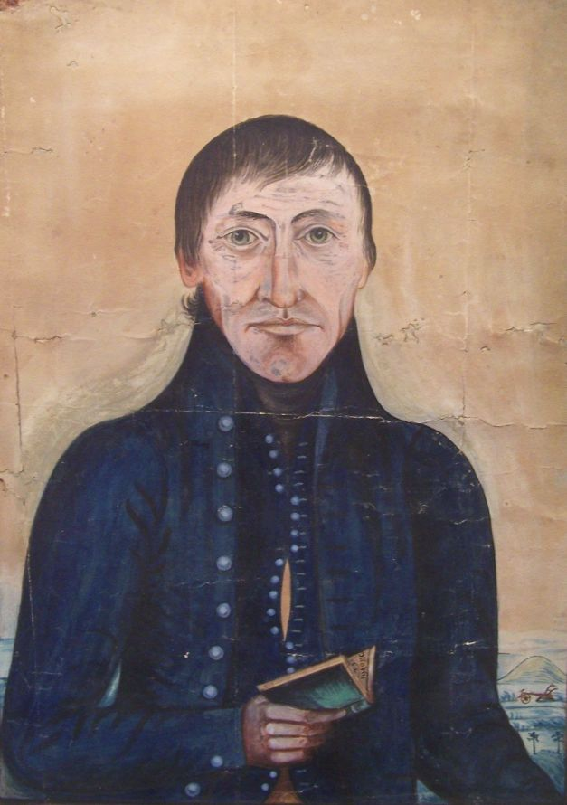 Autoportrét Václava Jana Maška